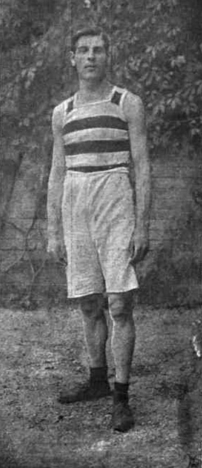 Schubert Ernő egy prágai atlétikai versenyen